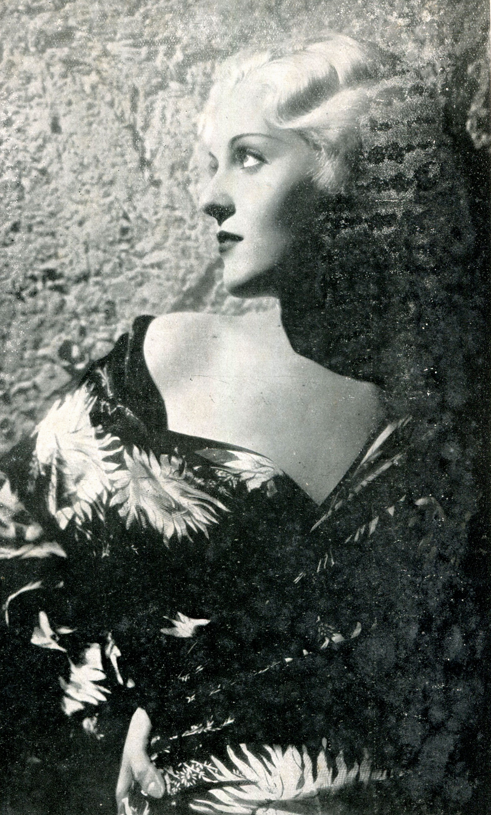 Un'immagine dell'attrice Ketti Gallian pubblicata in Italia nel 1935